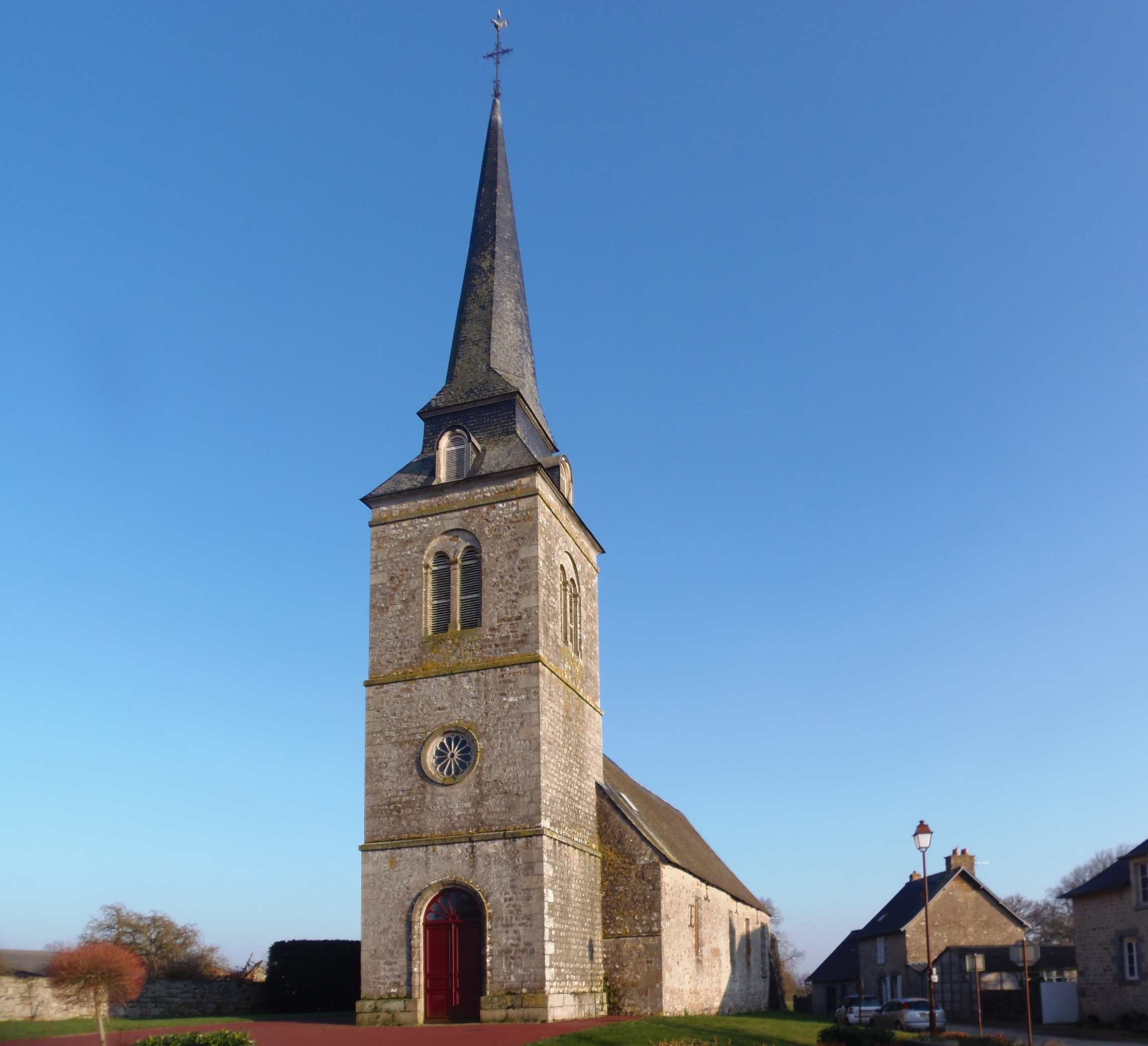 Saint-Ouen-le-Brisoult (Normandie, France). L'église Saint-Ouen.